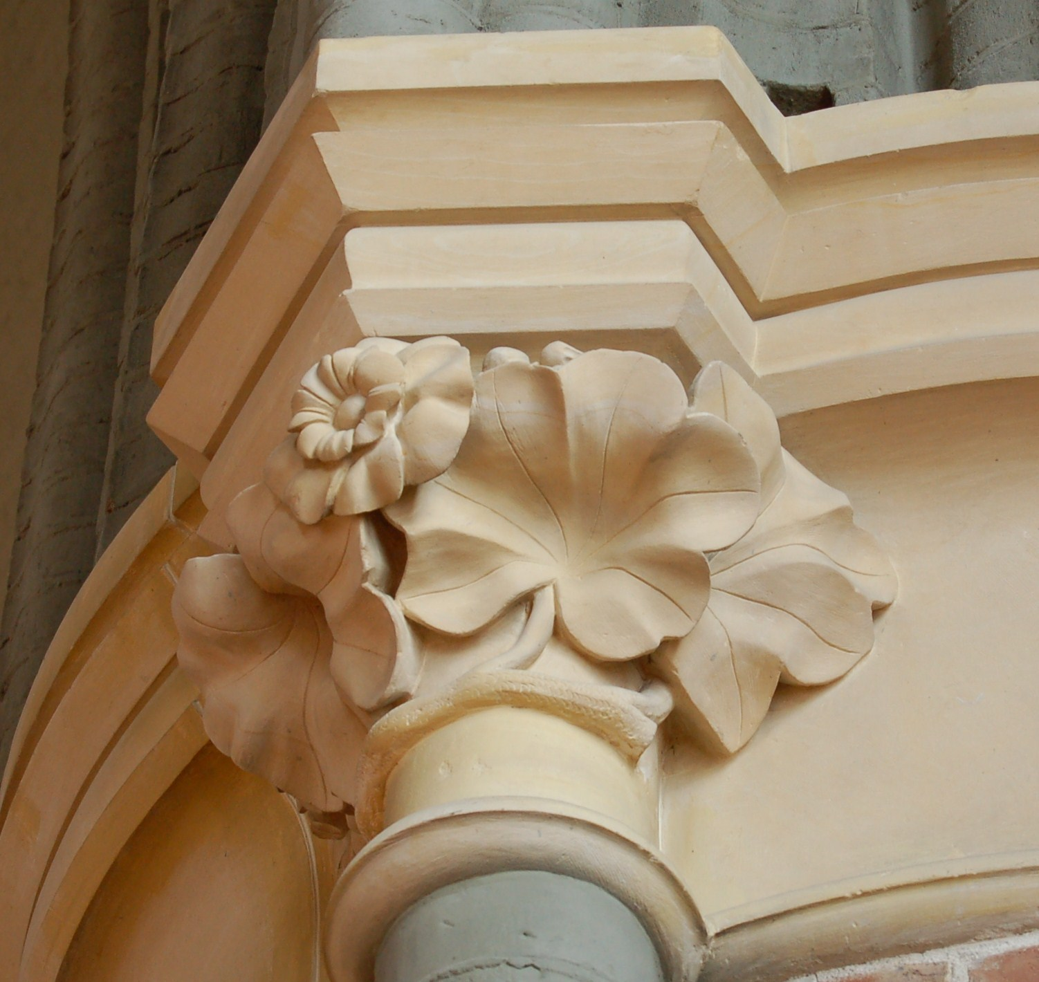 Trefoldighetskirken i Oslo: Kapitel